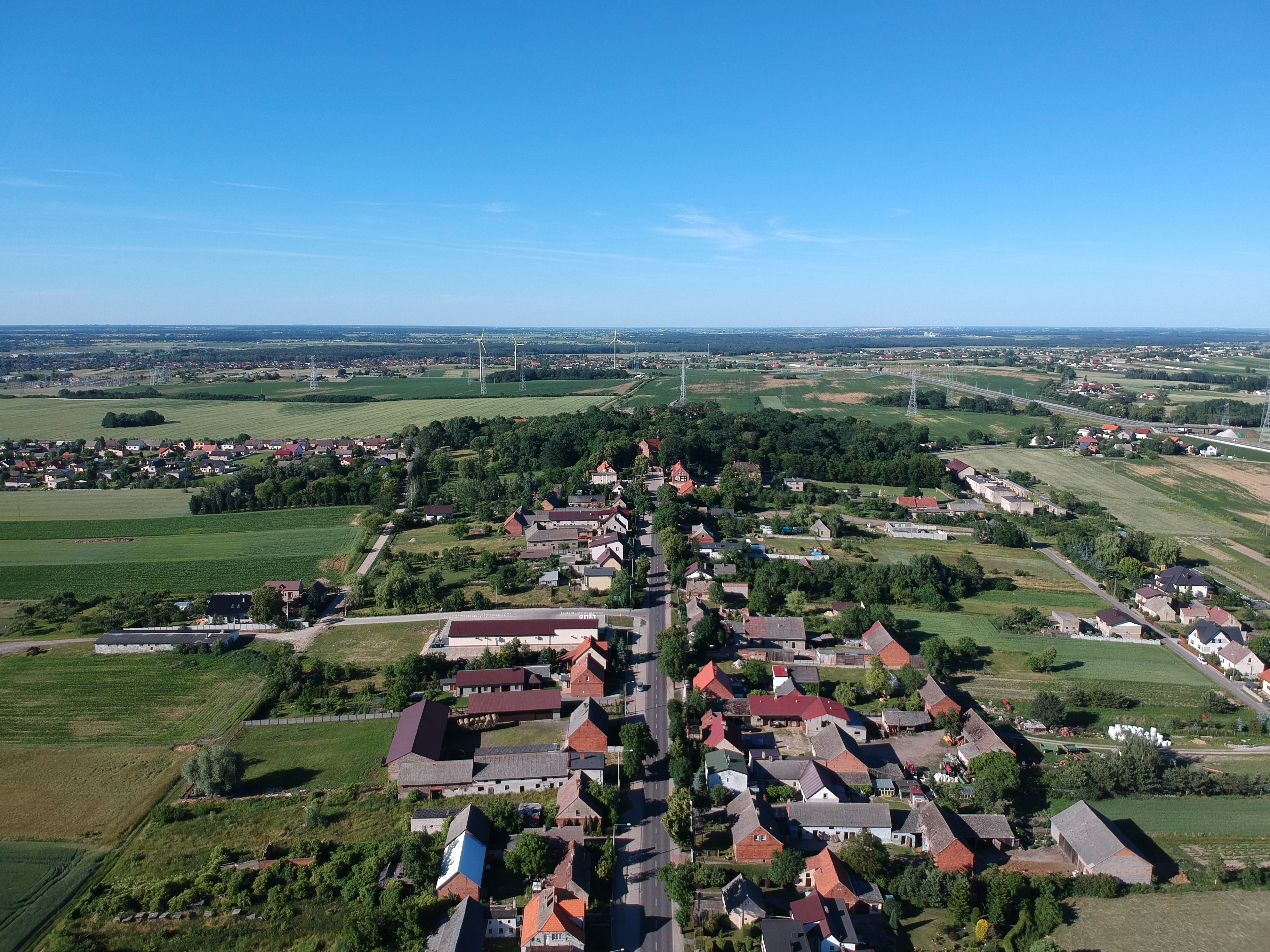 wioska z lotu ptaka